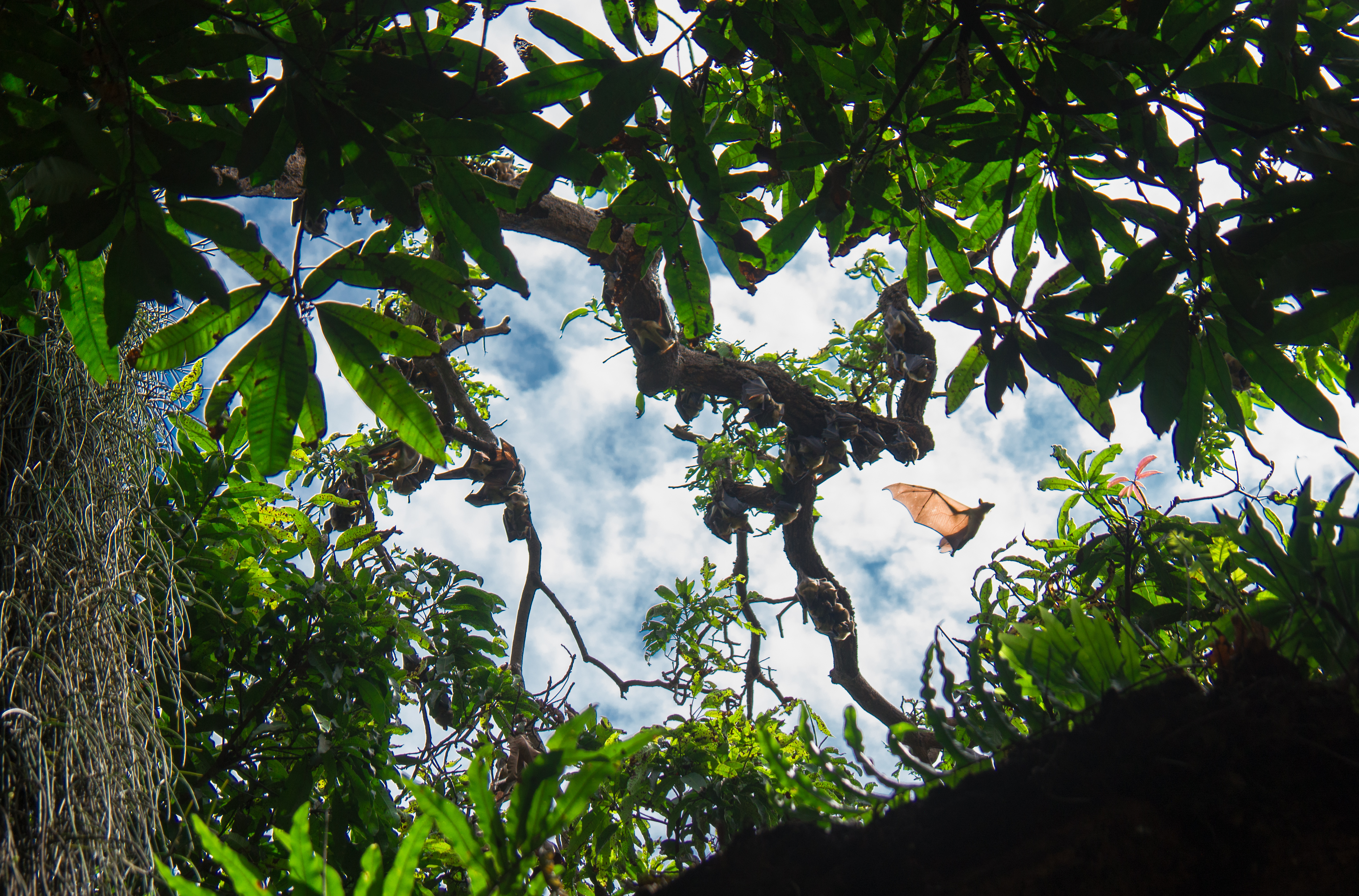 Chauves-souris dans le parc, les cascades du Mfoundi à Yaoundé